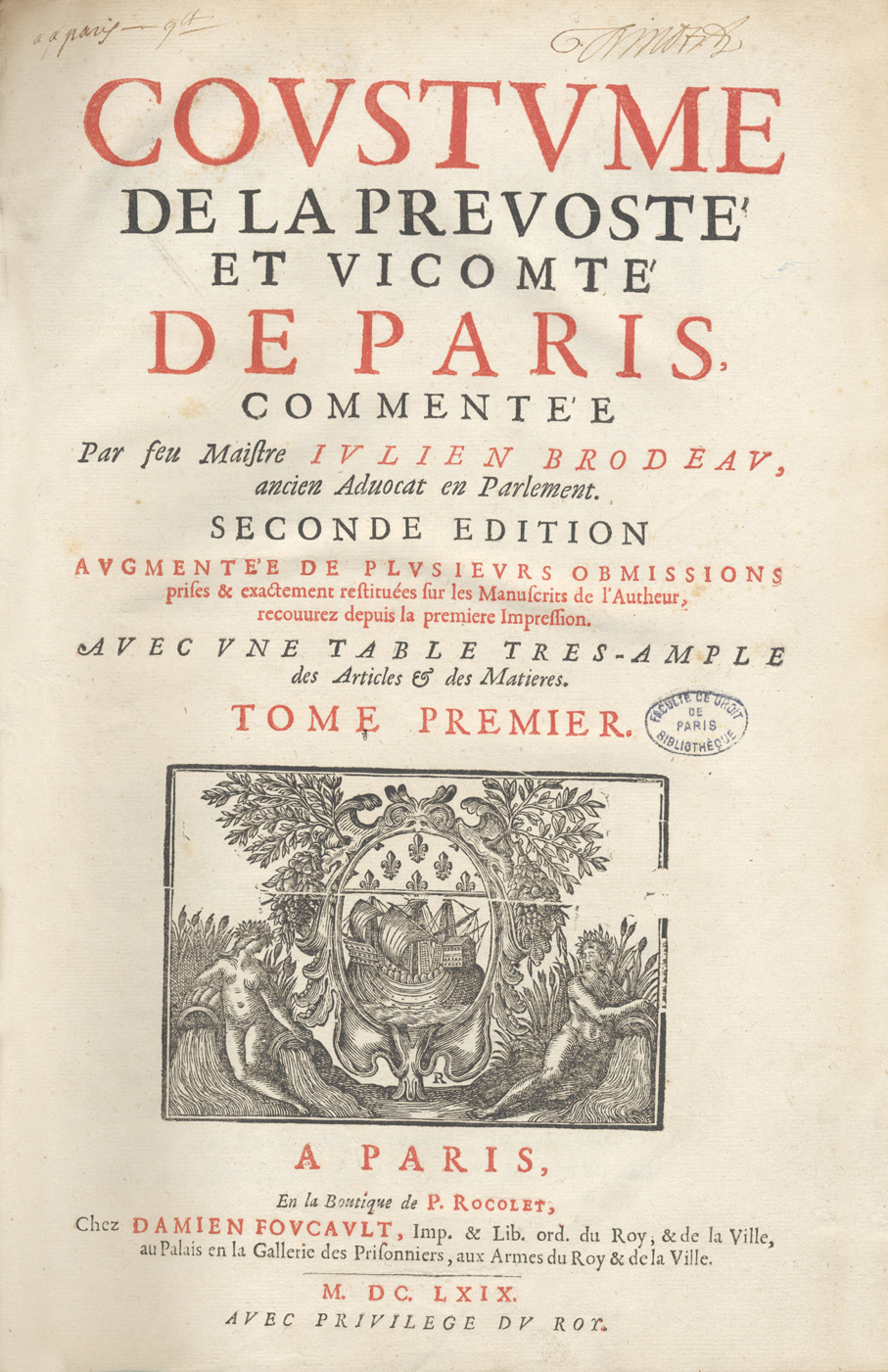 Coustume de la prevosté et vicomté de Paris